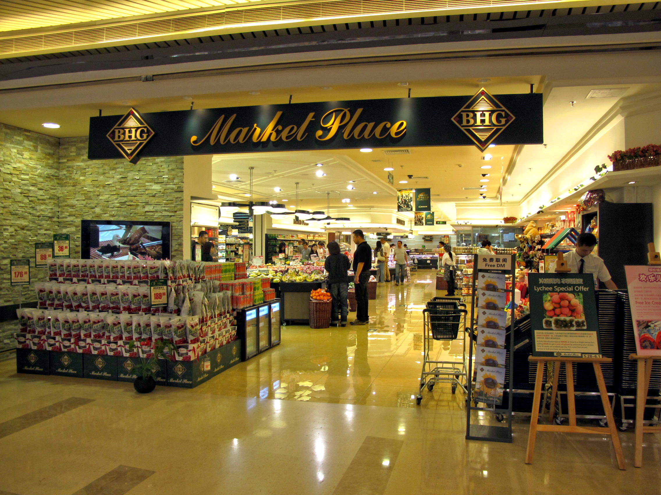 BHG Market Place Sanlitun Village Store in Beijing